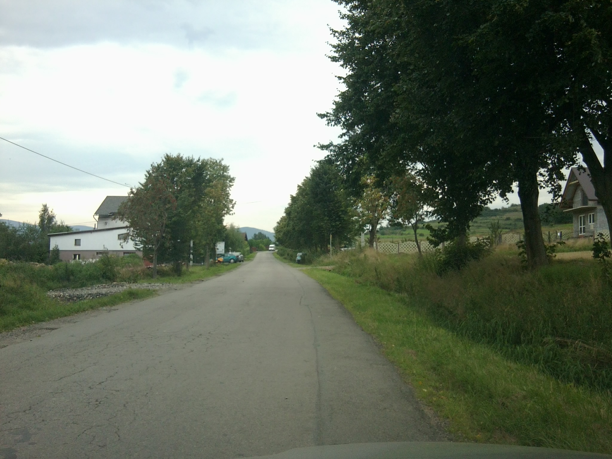 Ulica Wajdowa w Radziechowach, widok w kierunku Przybędzy